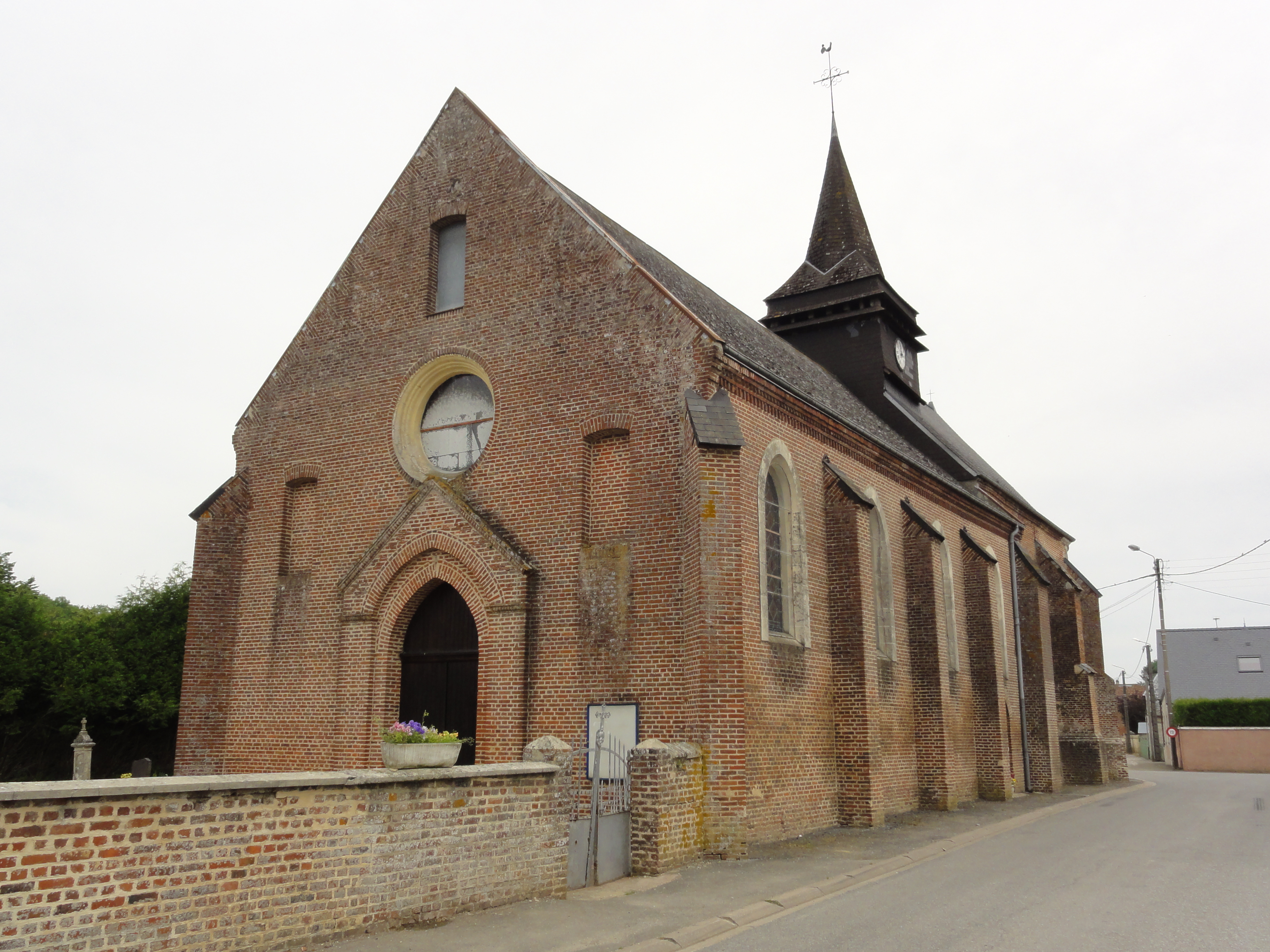 Soize (Aisne) église